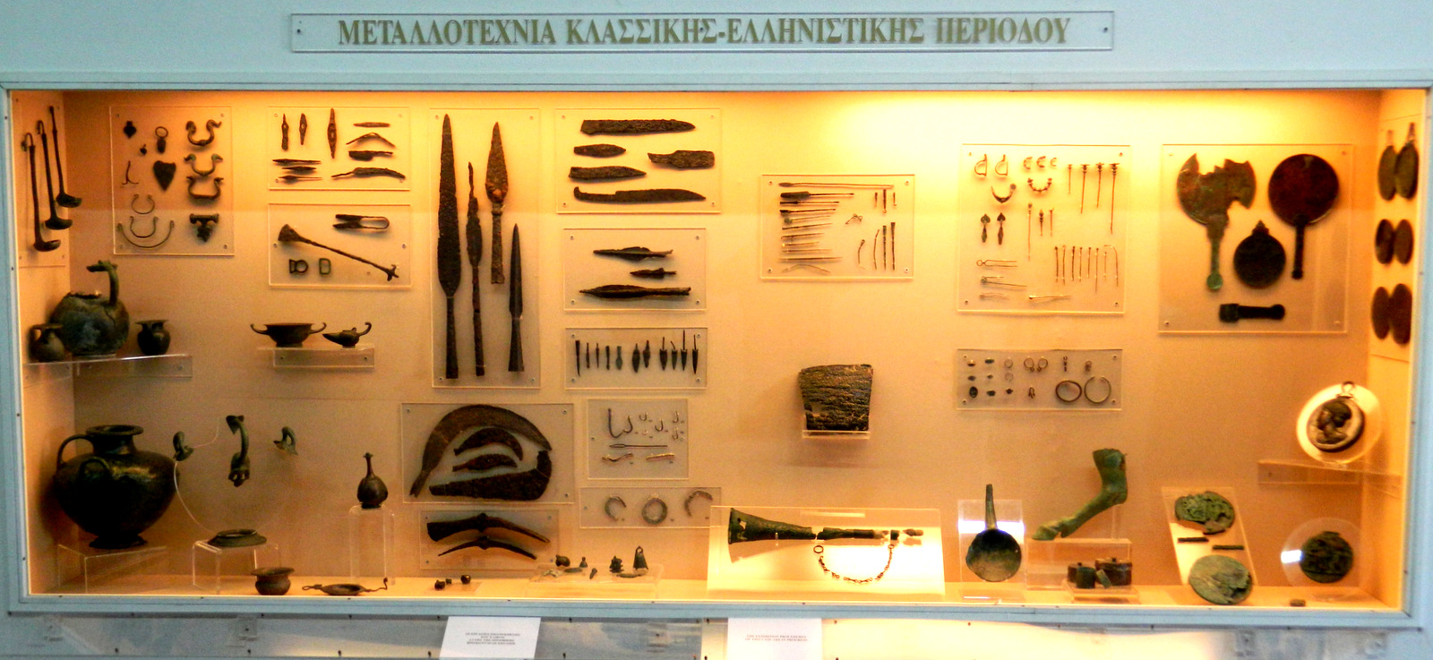 Od broni po damskie lusterka, precyzyjne akcesoria do makijażu itp. drobiazgi. Okres klasyczny i hellenistyczny. Eksponaty w Okręgowym Muzeum Archeologicznym, Lamia, Grecja